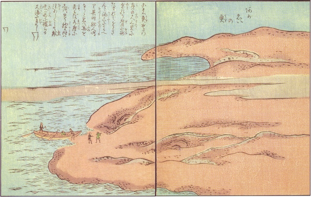 Akaei-no-uo (赤ゑいの魚) from the Ehon Hyaku monogatari (絵本百物語)